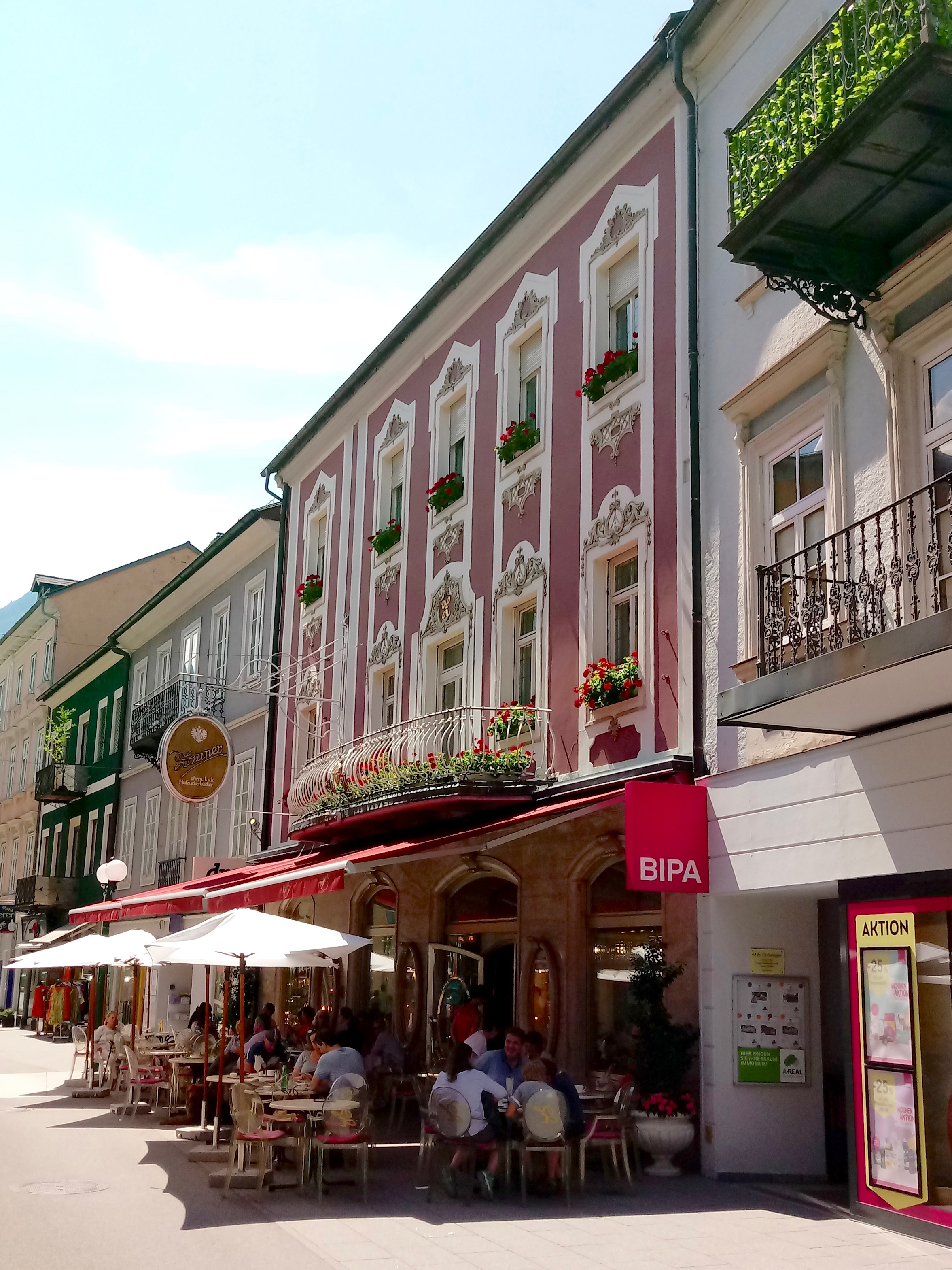 Stammhaus der Konditorei Zauner in der Pfarrgasse in Bad Ischl.